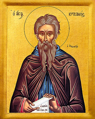 Ciríaco, o Anacoreta